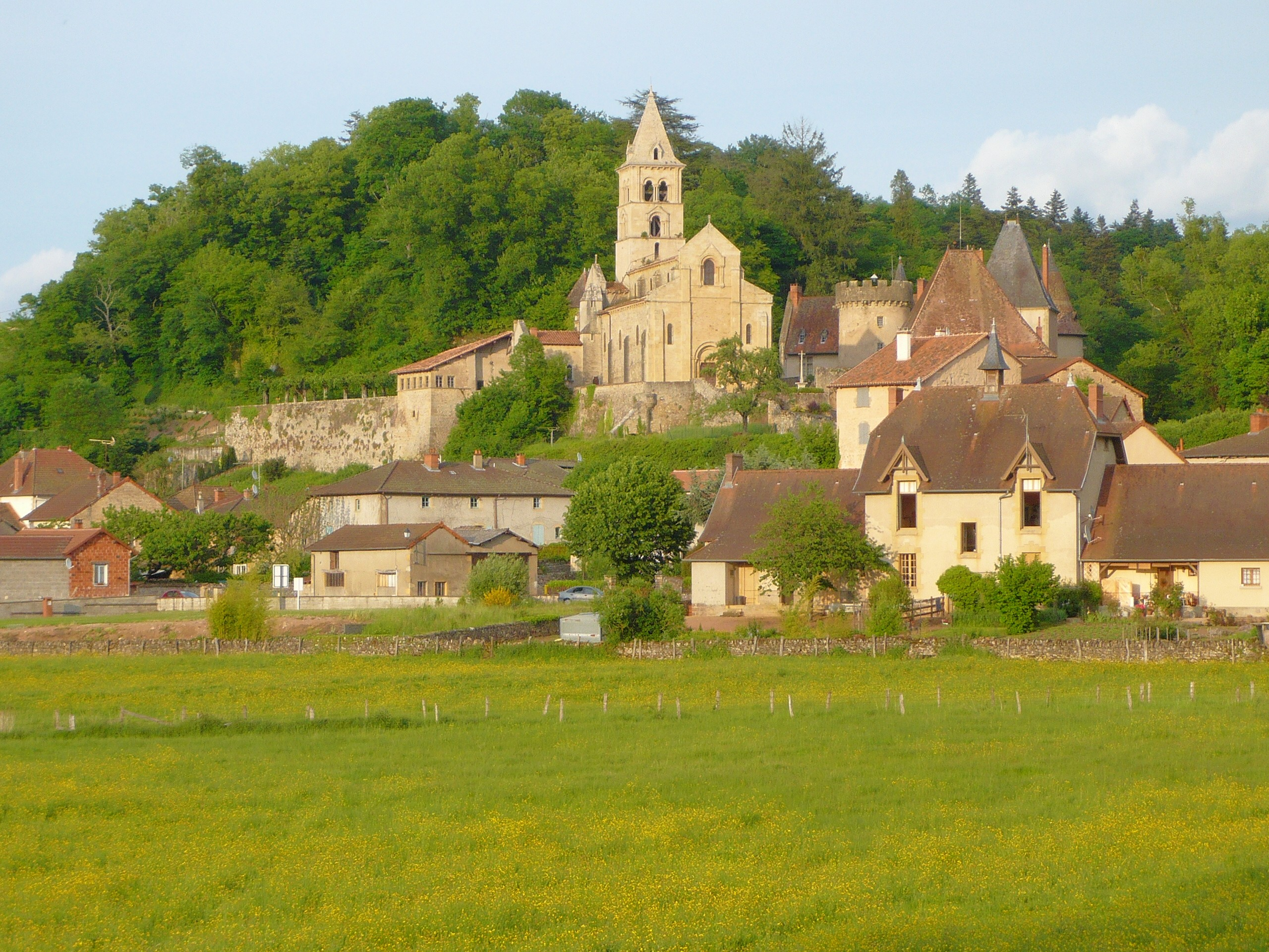 vue générale de Châteauneuf